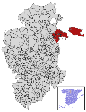 Ubicación de la Comarca del Ebro en la provincia de Burgos